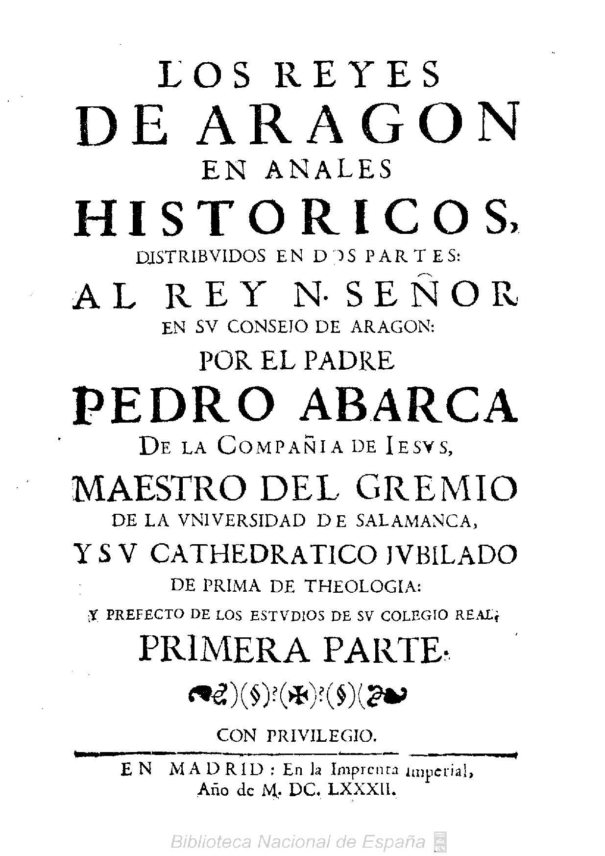 Los Reyes de Aragon en anales historicos : distribuidos en dos partes... por el padre Pedro Abarca de la Compañia de Iesus ... ; primera parte Autor: Abarca, Pedro (1619-1693) Fecha: 1682 Datos de edición: En Madrid en la Imprenta Imperial